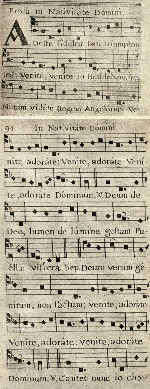 Frühestes erhaltenes Manuskript des Adeste fideles, ohne Verfasserangabe, John Francis Wade zugeschrieben, auf die 1740er Jahre datiert